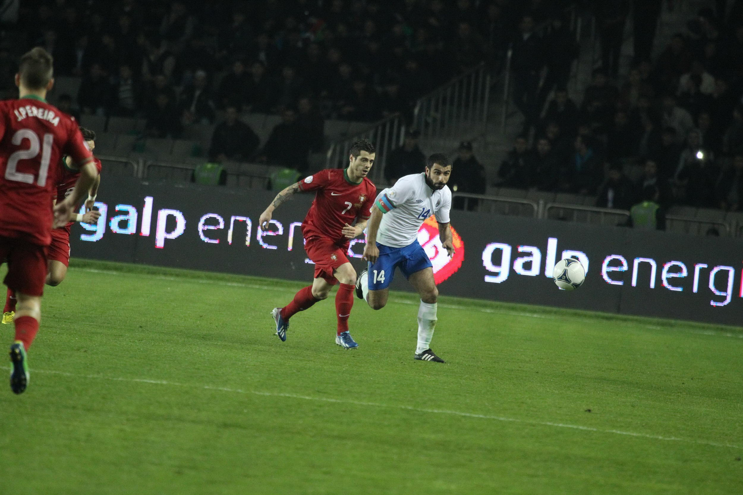 Rəşad Sadıqov milli komandanın heyətində